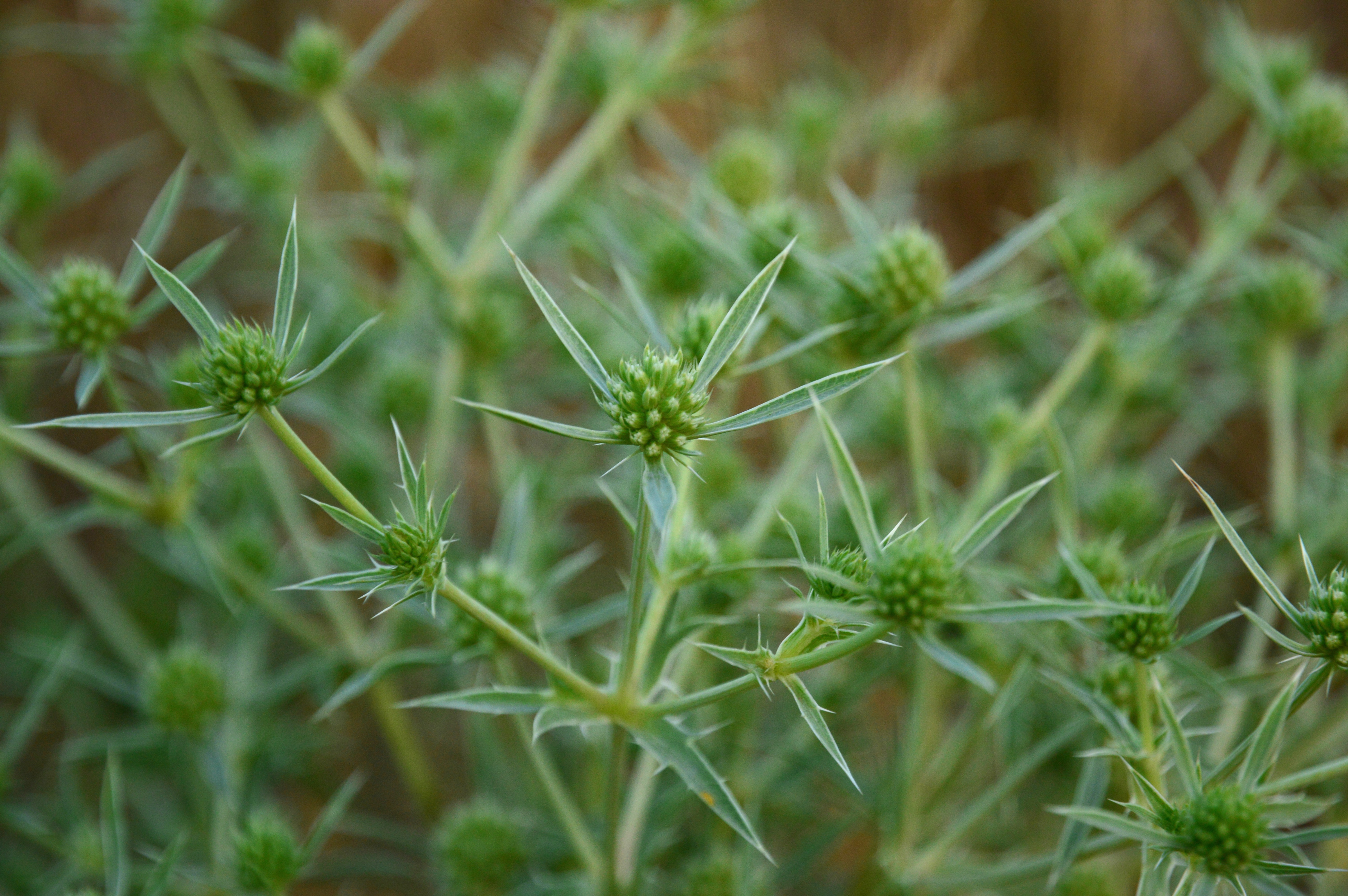 Миколайчики польові (Eryngium campestre) на гранітних відслоненнях р. Рось.